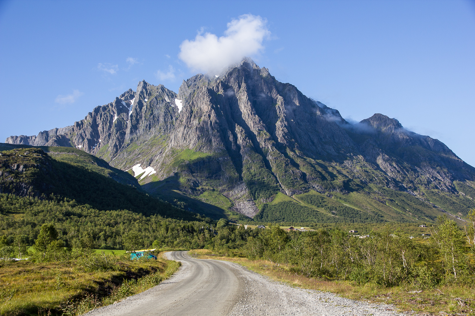 Standalseidet med Sætretindane